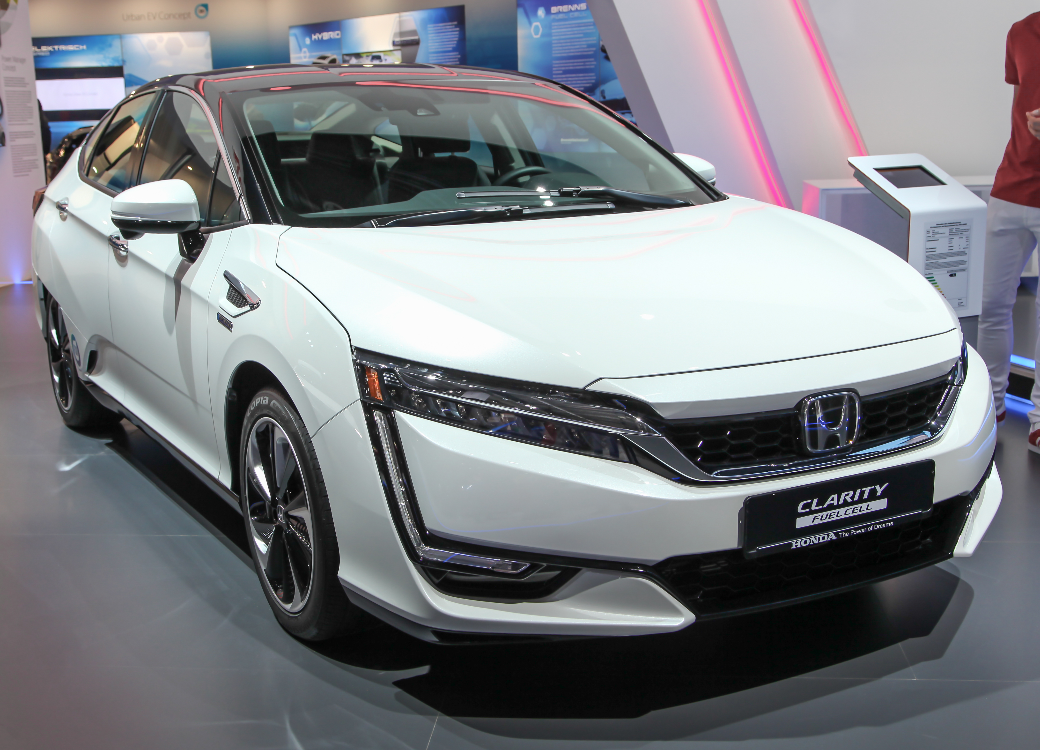 Honda Clarity Fuel Cell auf der IAA 2017